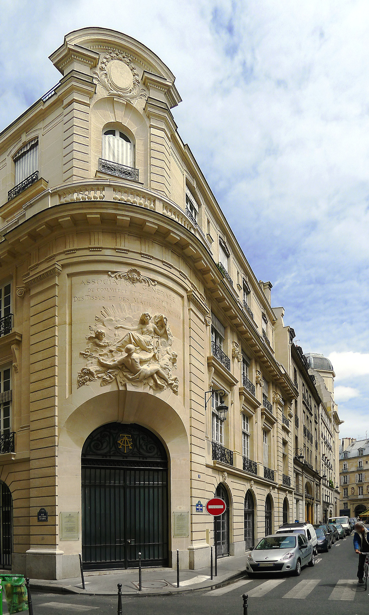 Angle arrondi et relief de l'immeuble situé au coin des rues des Bons-Enfants (n° 18) et Montesquieu (n° 8) vu depuis le passage Vérité - Paris Ier